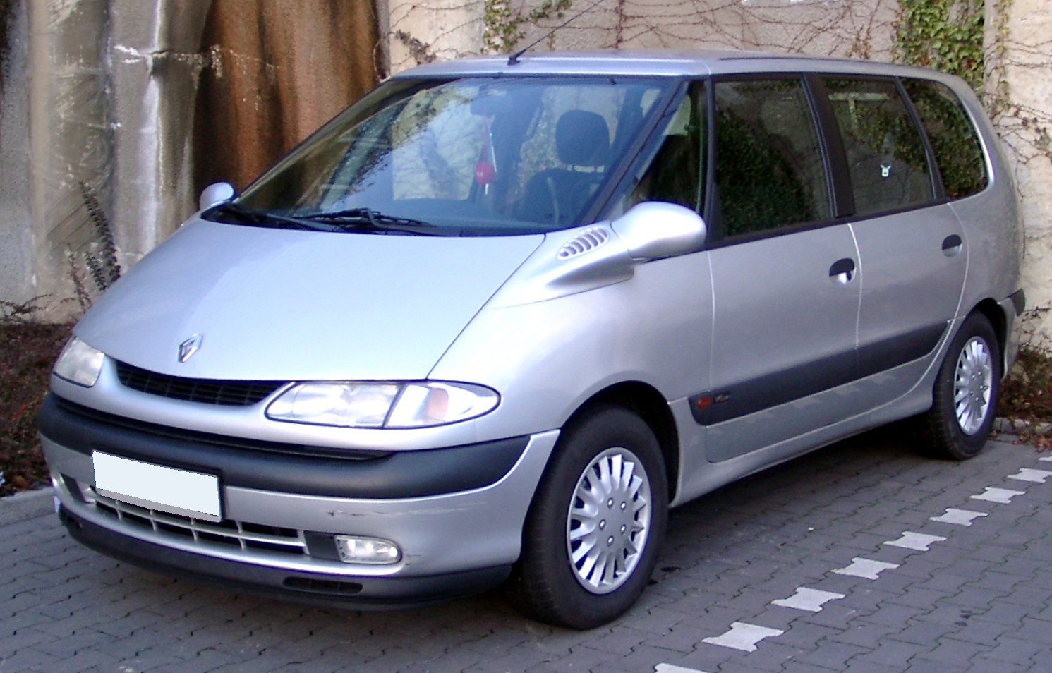 Renault Espace, 3. Generation